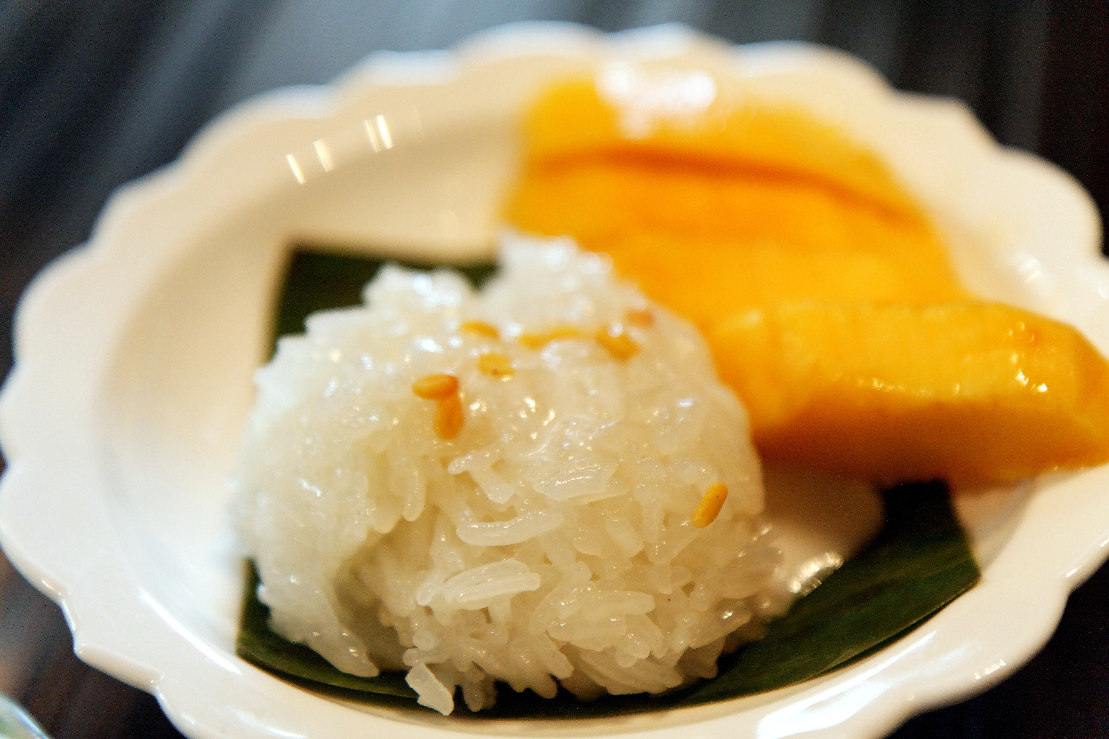 Erawan Tea Room at Grand Hyatt Erawan Bangkok Hotel, Thailand